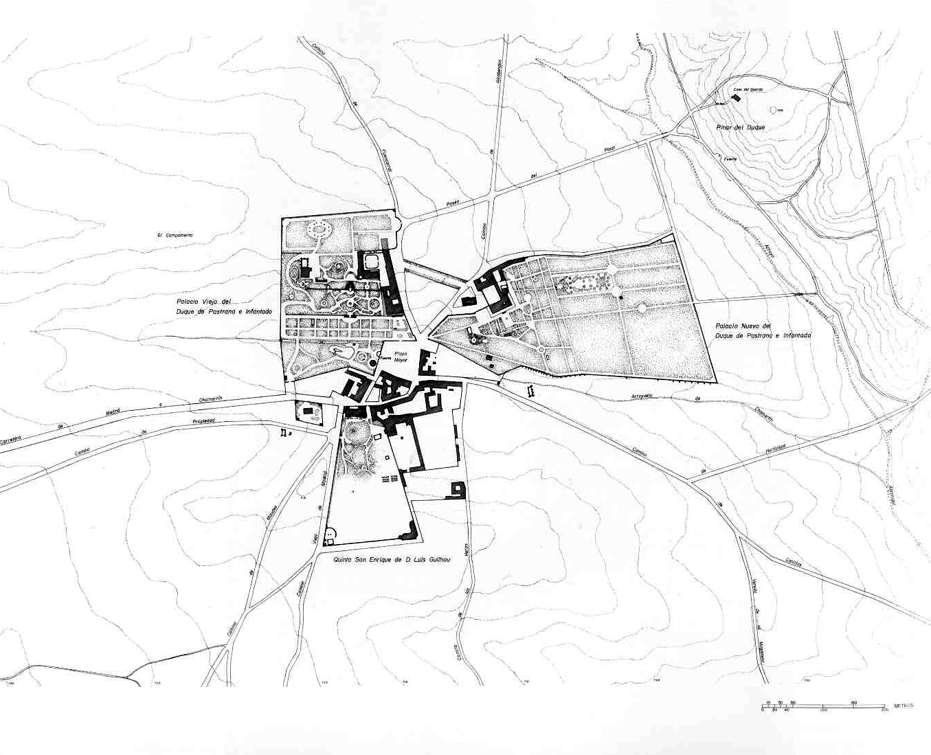 Plano del pueblo de Chamartín